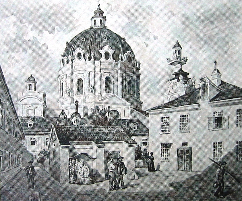 Mondscheinhaus Wien im 19. Jahrhundert